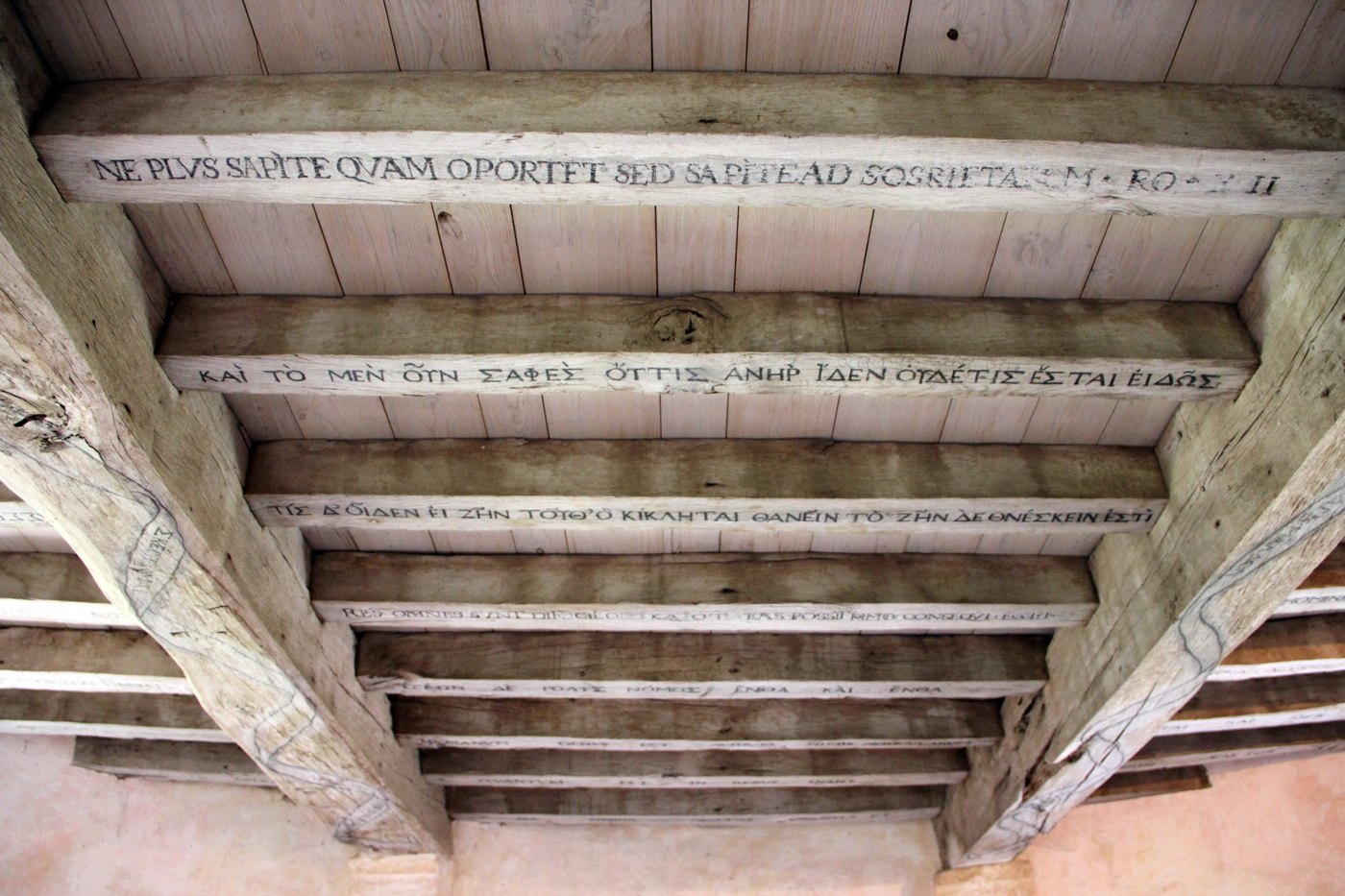 Plafond de la bibliothèque de Montaigne. Tour de Montaigne à Saint-Michel-de-Montaigne. Montaigne a fait graver sur les poutres ses maximes favorites empruntées à des auteurs grecs et latins.